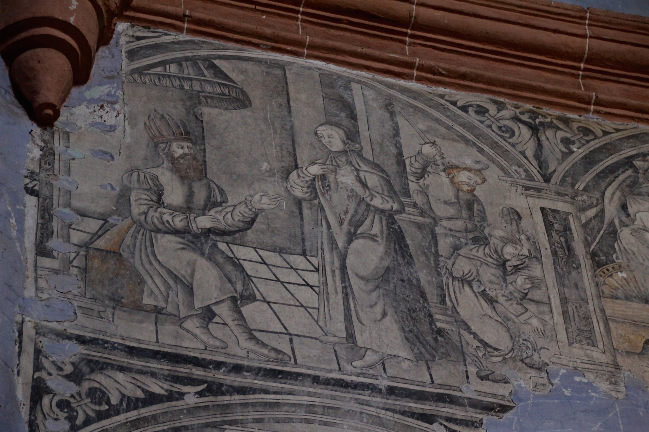 Fresco escena bíblica en la Parroquia de Todos Santos, Zempoala S.XVI